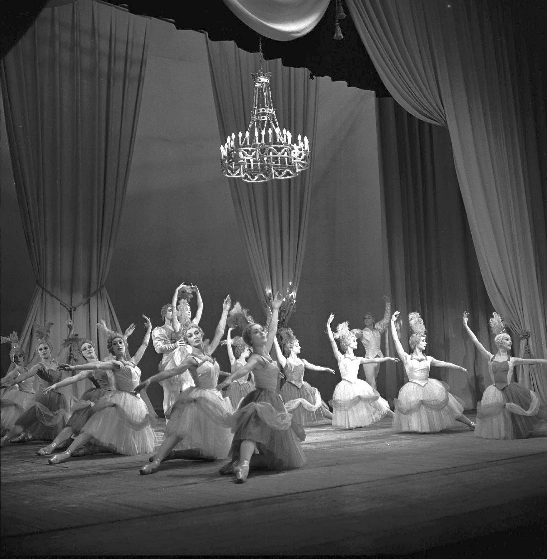 Théâtre du Capitole. Pas de date. Vue d'un ballet au théâtre du Capitole.